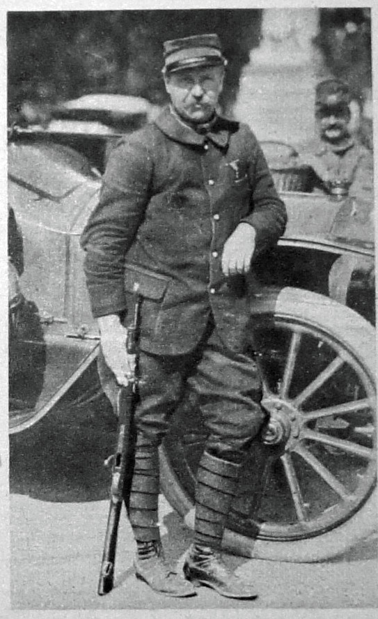 Le Miroir N° 72 page15 des nouvelles des athlètes au front :Arthur Duray automobiliste.